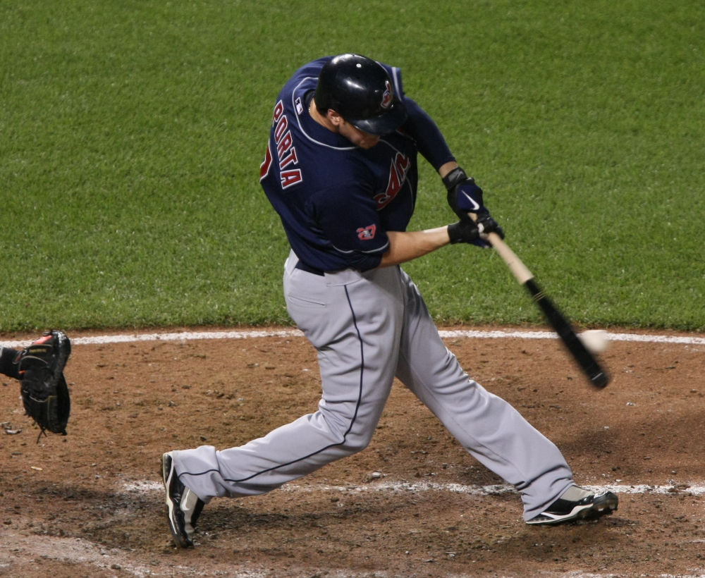 Matt LaPorta